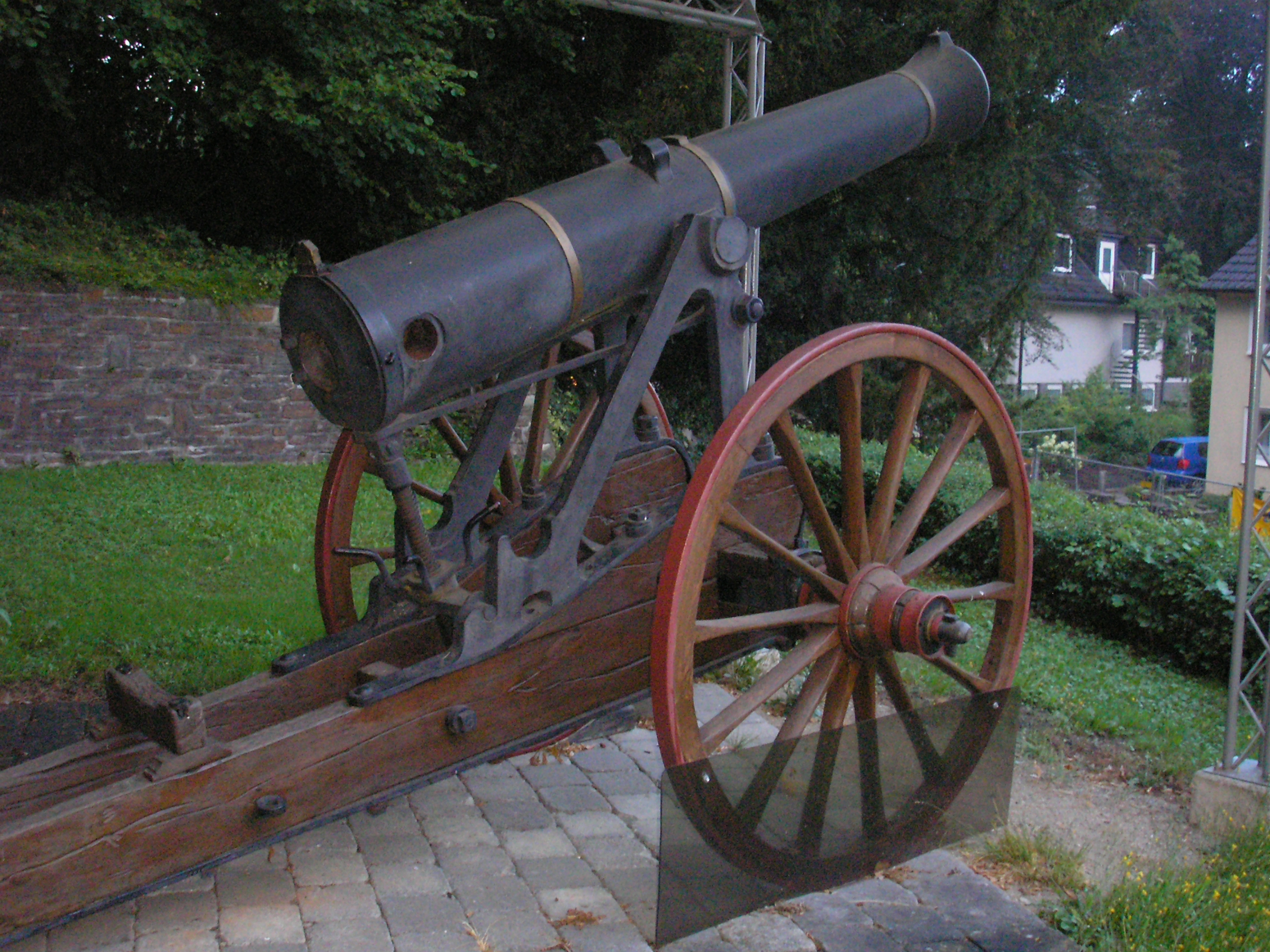 Herchener Kanone, Windeck-Herchen. Die "Herchener Kanonen" sind französische Geschütze aus dem Deutsch-Französischem Krieg 1870/71. Am Ende des Ersten Weltkrieges gelangten sie vom Kölner Heumarkt nach Herchen. Ihren heutigen Standort erhielten die Kanonen in der 1935 errichteten Anlage des "Thingplatzes" in Herchen. In den letzten Jahren fanden aufwendige Restaurationen statt. (Quelle: Bürger- und Verschönerungsverein Herchen)